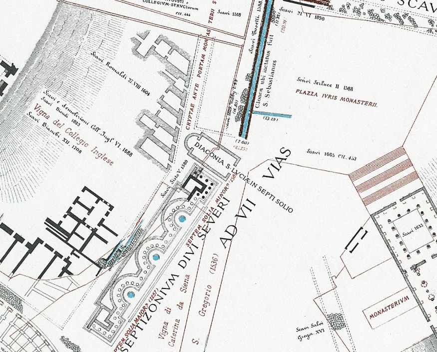 Pianta di Lanciani